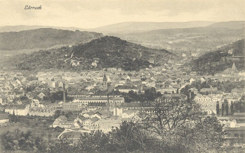 Lörrach um 1906, Fabrikgelände der KBC und die Lörracher Tuchfabrik, Blick vom Tüllinger Berg in Richtung Osten